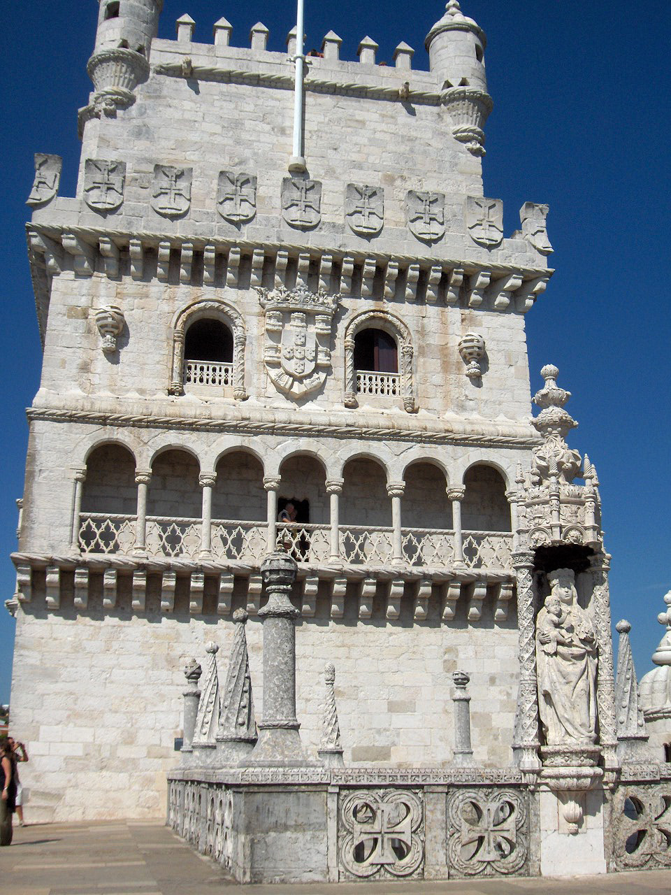 Torre de Belém ,Belém (Lisbon), Portugal